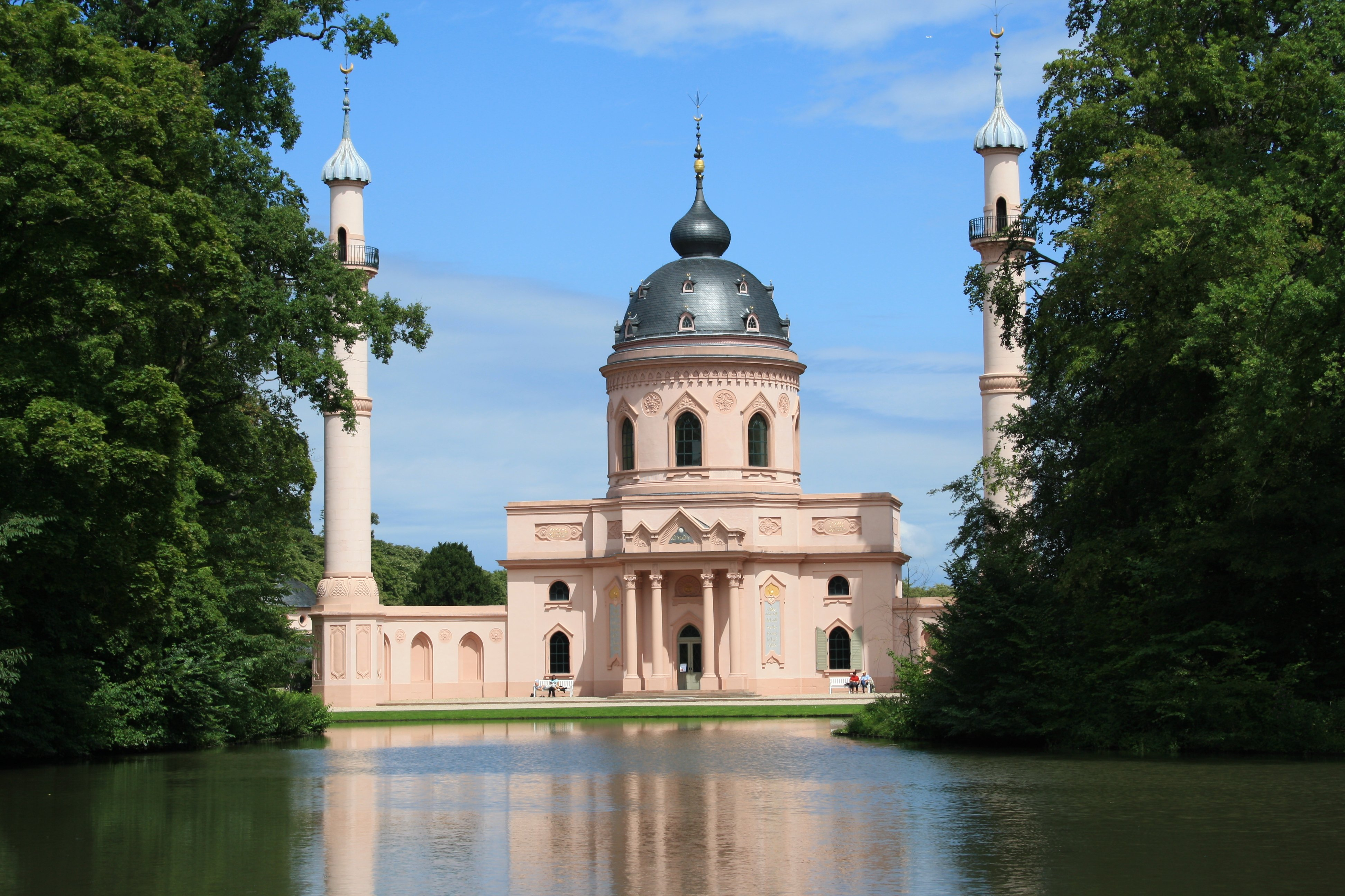 Moschee Schwetzingen